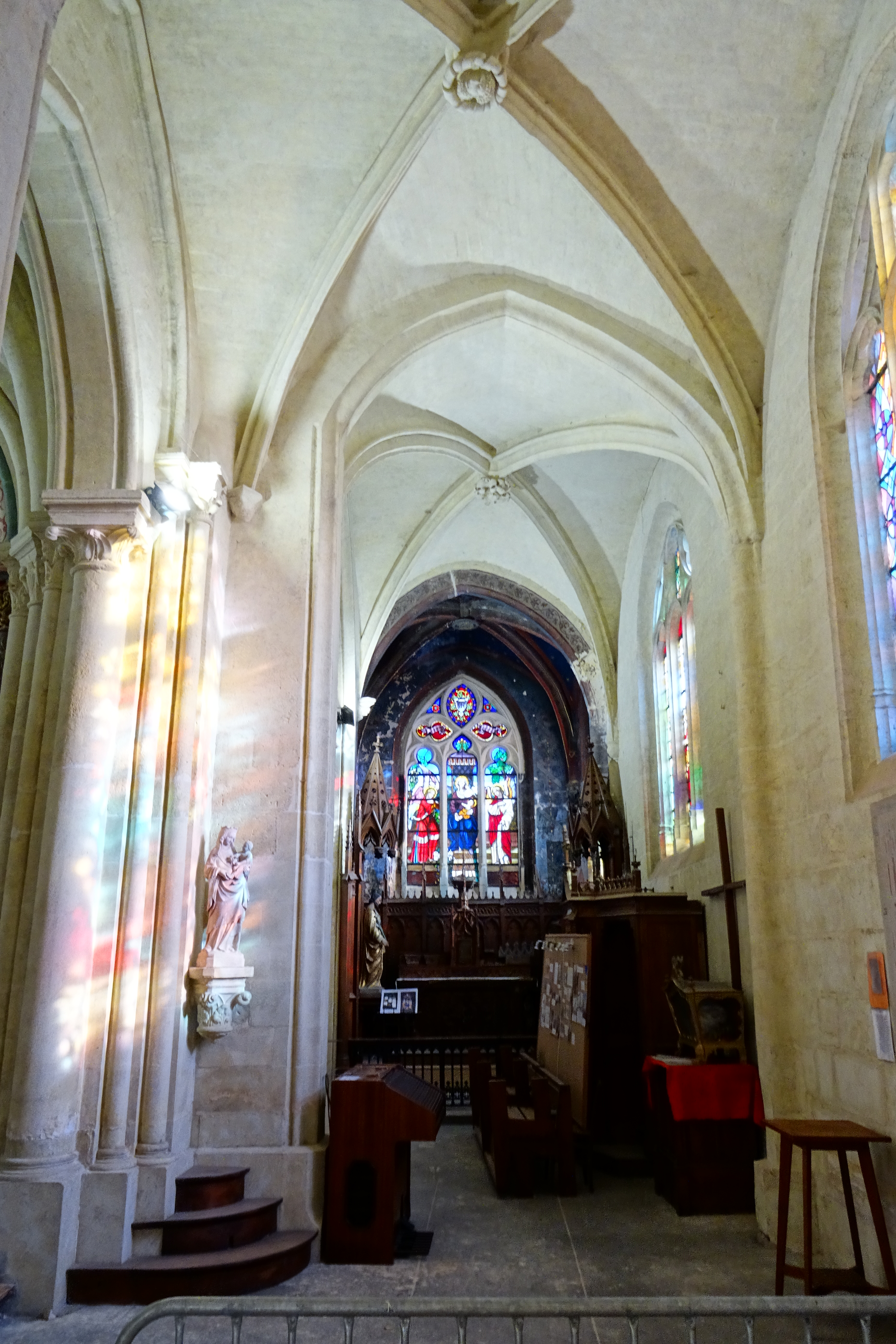 Intérieur de l'église - voir le titre du fichier.